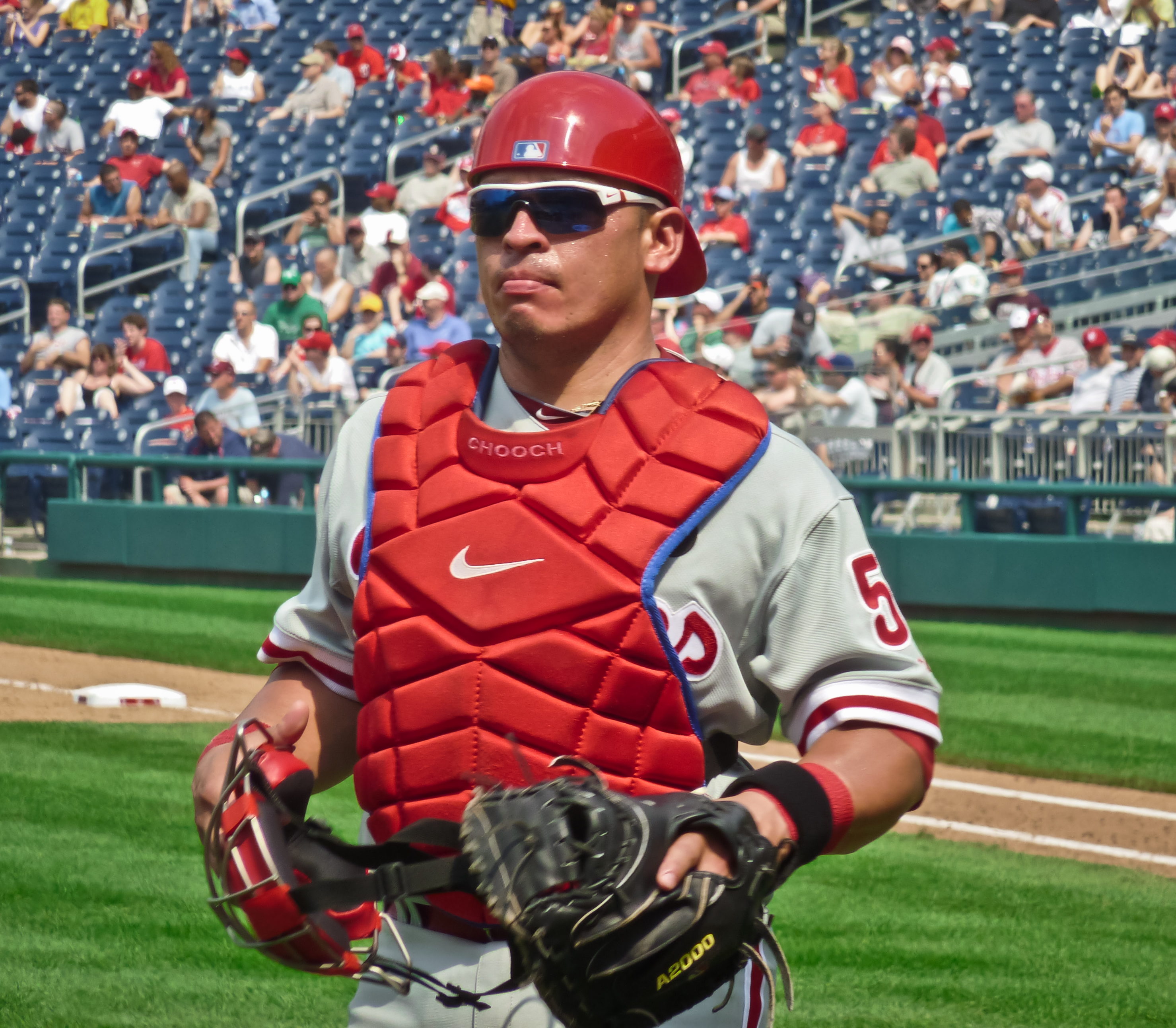 Carlos Ruiz